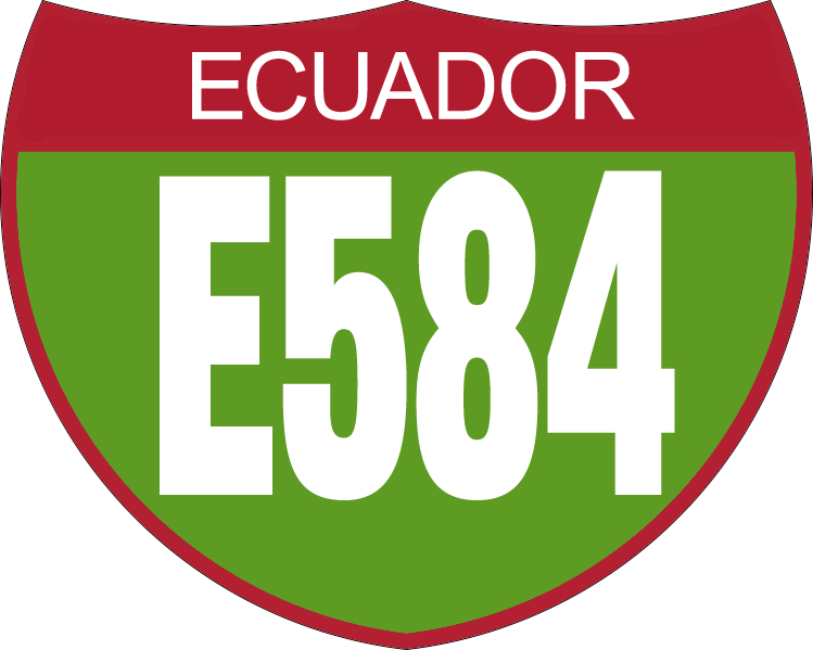 Disco de Identificación Ruta E584